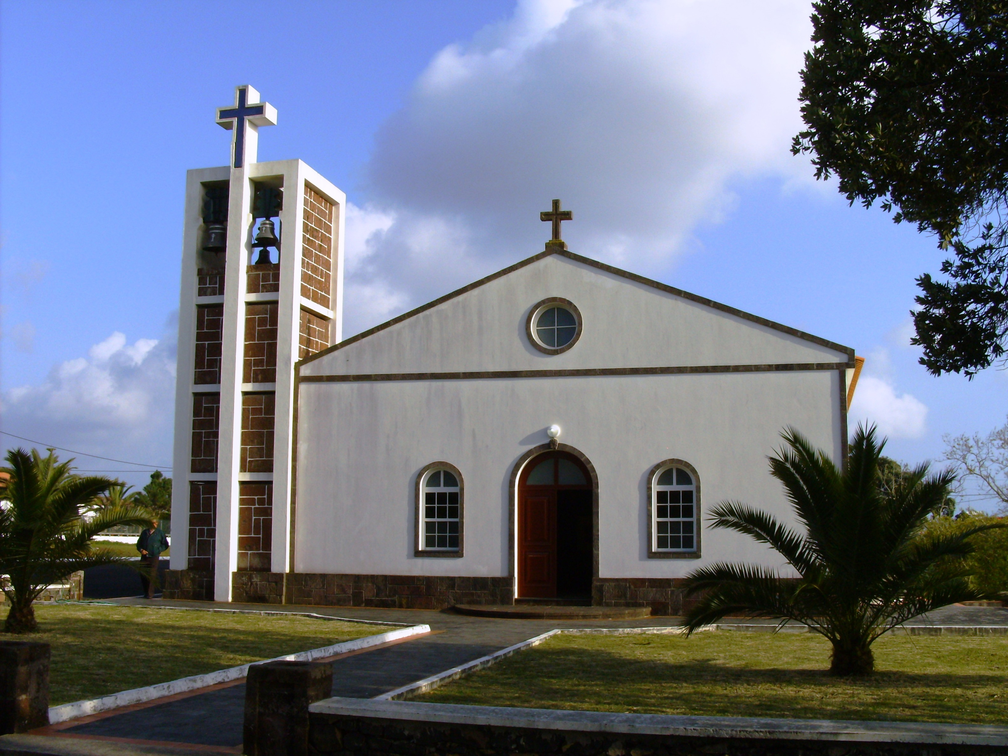 Igreja de Nossa Senhora do Ar, Vila do Porto, Ilha de Santa Maria (Açores), Portugal.